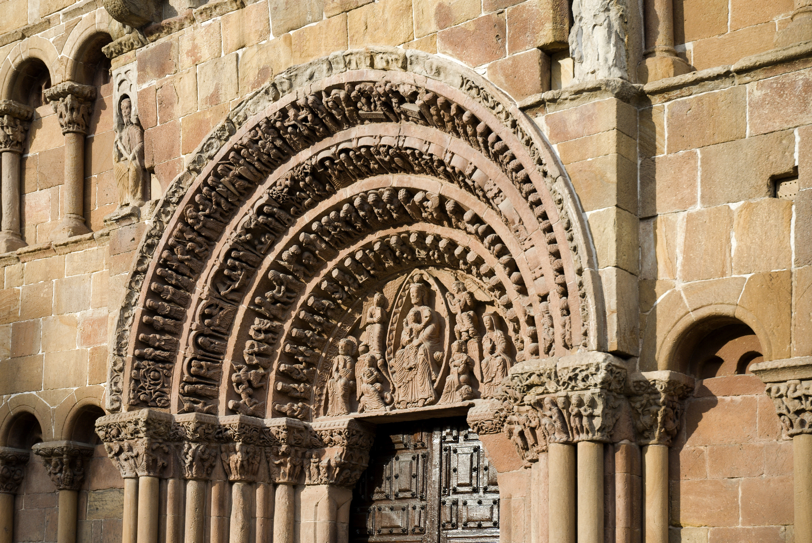 Tympan de l'église Santo Domingo de Soria XII S.